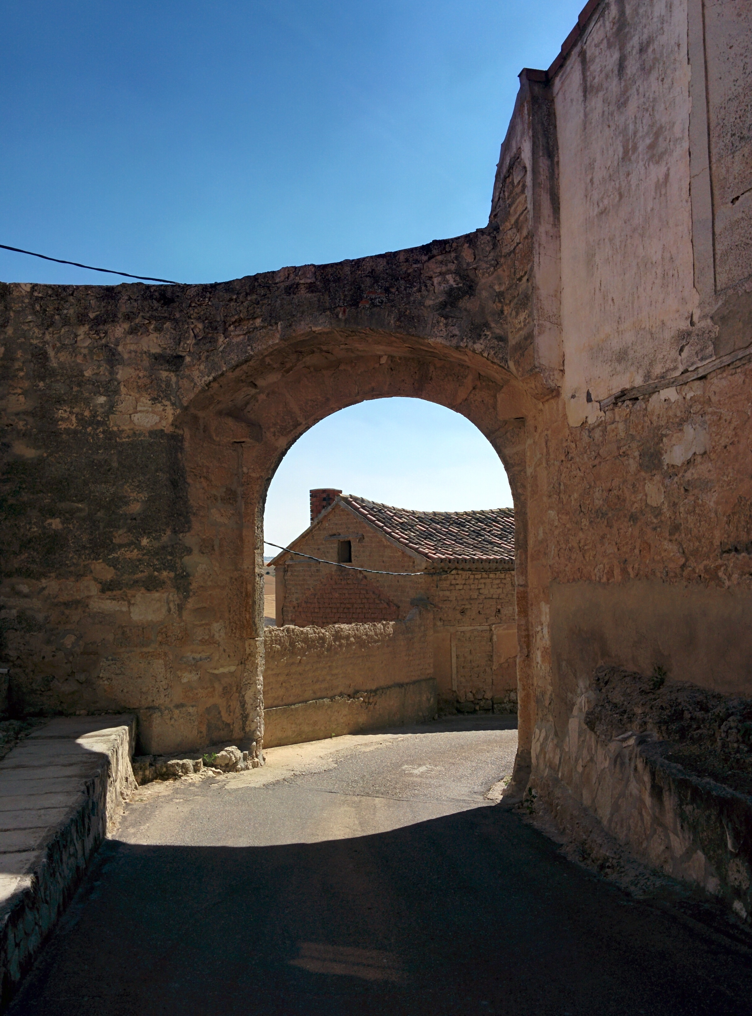 Castrillo de Onielo (Palencia, España).